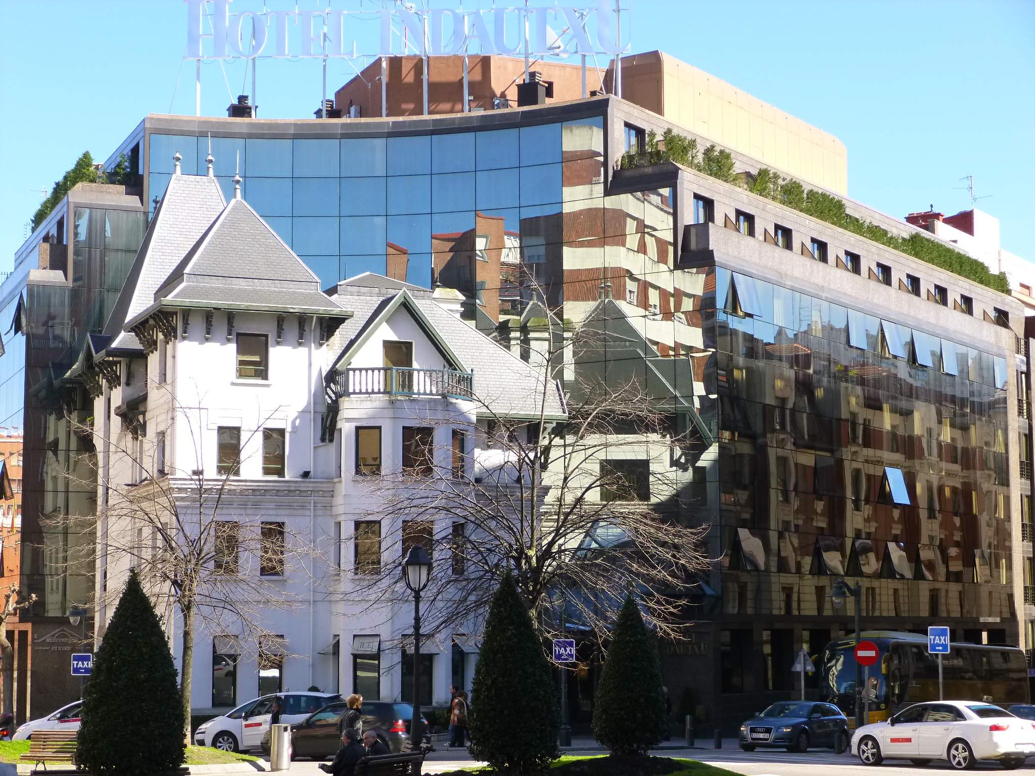 Hotel Silken Indautxu (Bilbao)